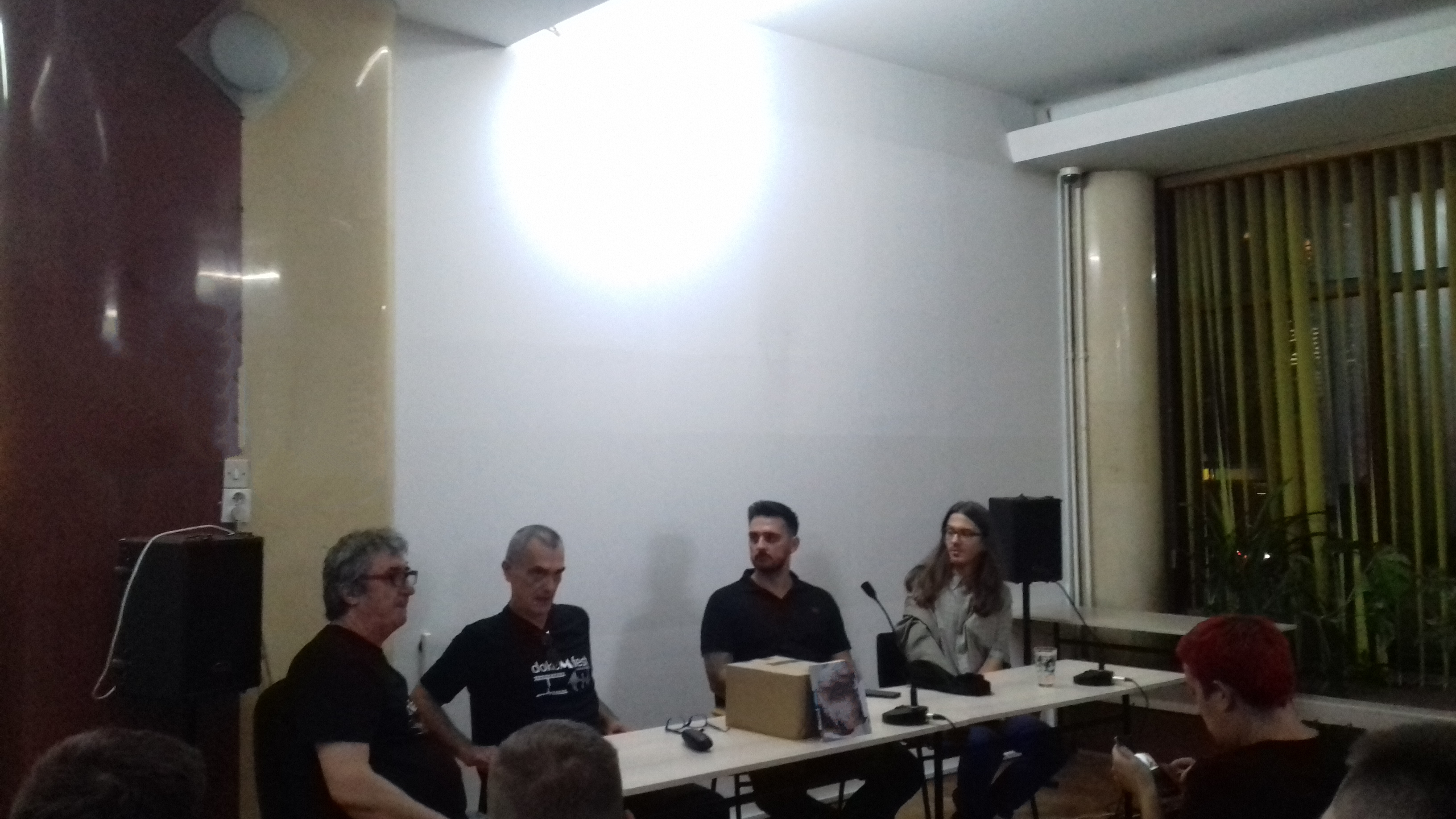 Бх. репер Френки на докуМфесту у Зеници, гдје је био један од учесника јавне трибине и презентовао свој биографски роман Кораци